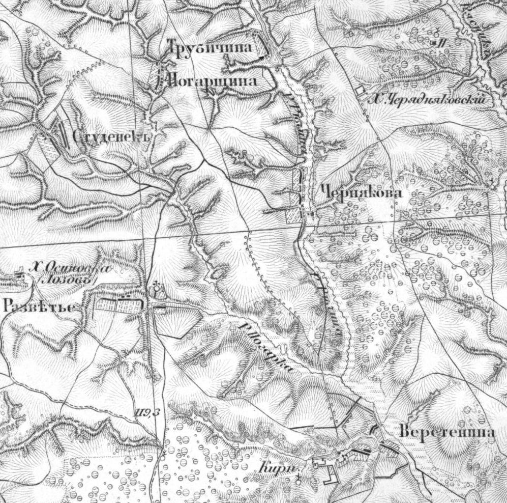 Карта местности, на которой сейчас расположен город Железногорск